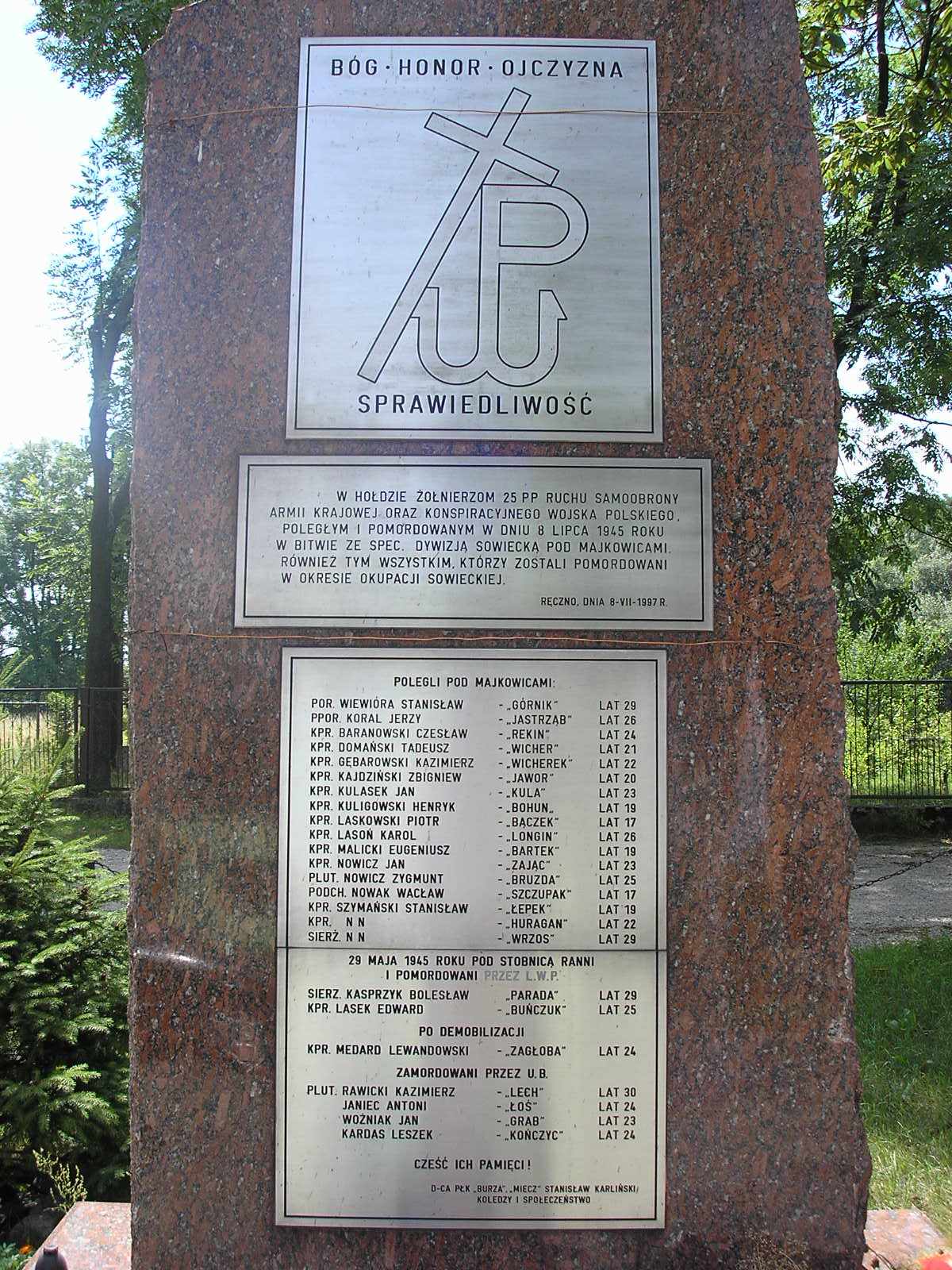 Pomnik żołnierzy AK w Ręcznie.